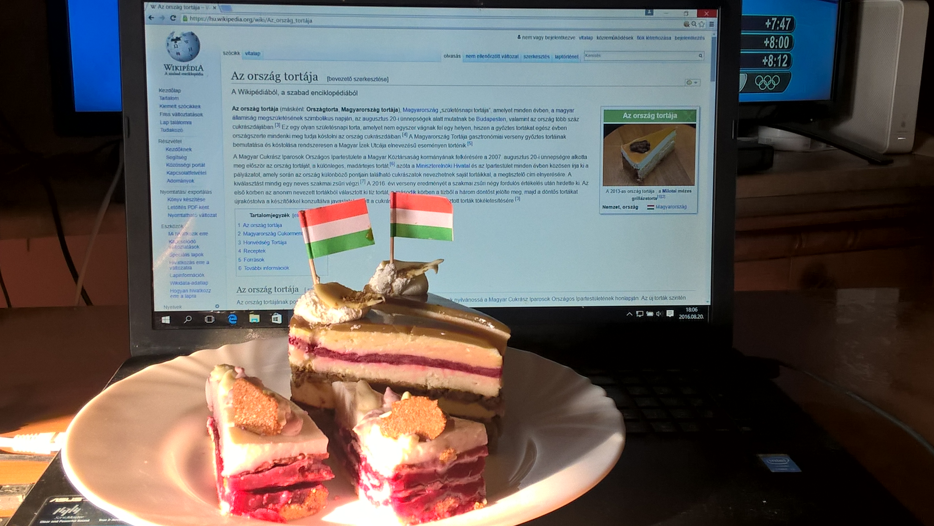 Az ország tortája 2016 a wikipédia szócikke előtt, zászlókkal díszítve az Őrség Zöld Aranya torta két szelete, elöl a cukormentes Áfonya hercegnő tortaszeletek